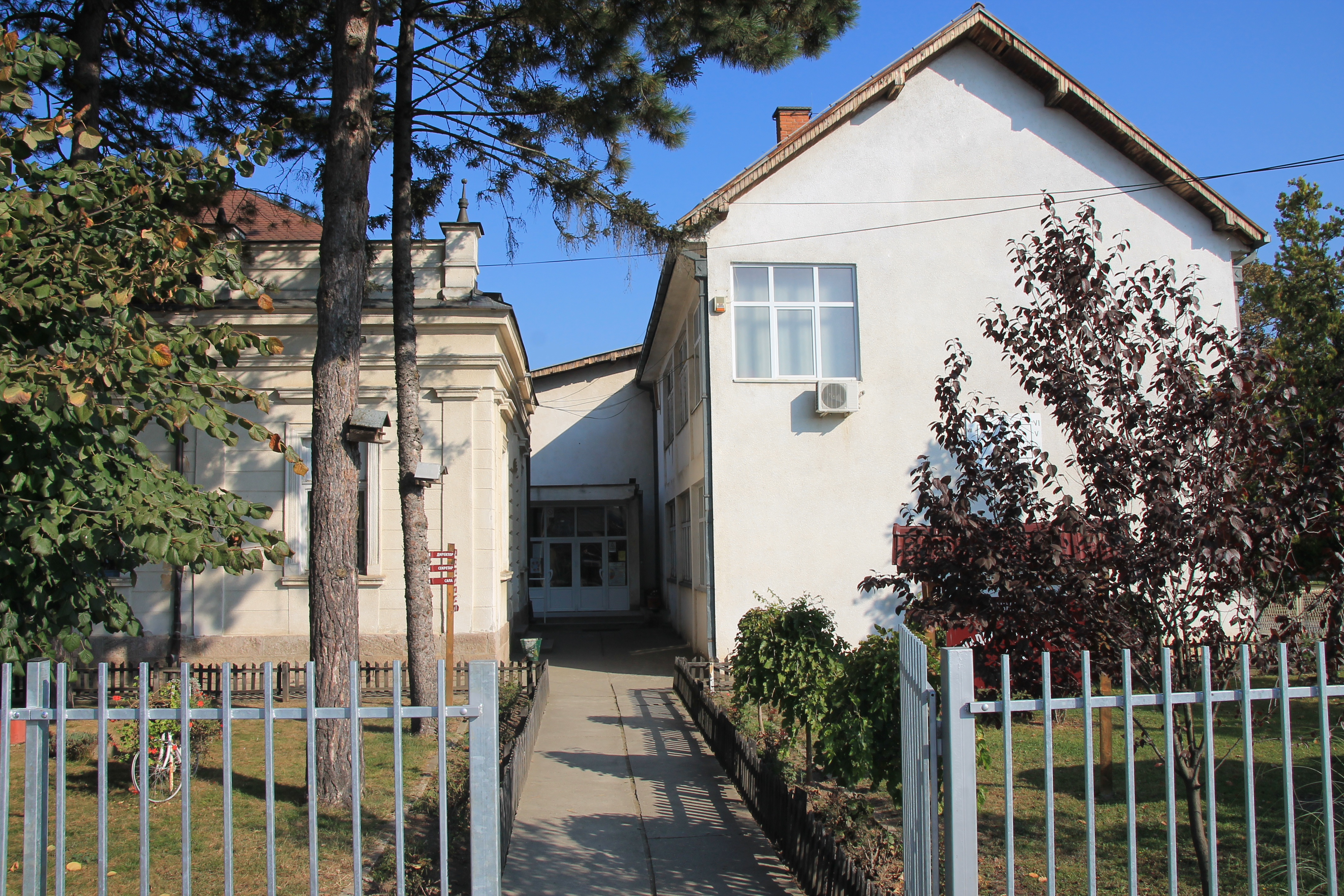 OŠ Vladisav Petković Dis Zablaće